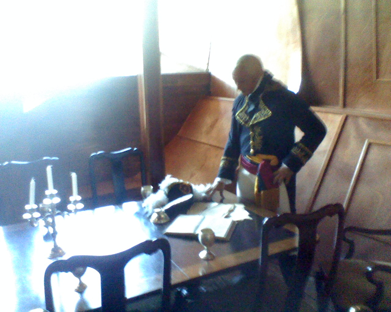 Figura de Mranda en el interior de la réplica del "Leander". (Parque "Generalísimo Francisco de Miranda" o "Parque del Este". Caracas, Ven.)